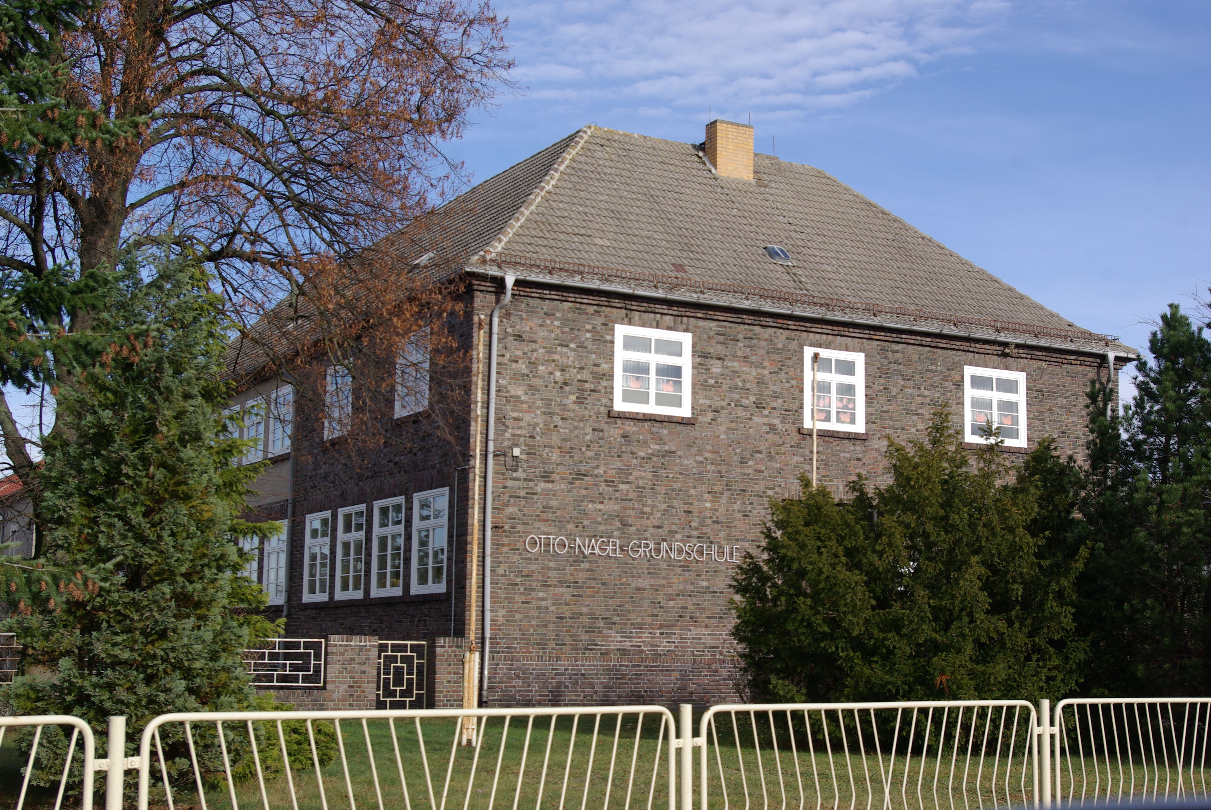 Schönewalde in Brandenburg. Die Otto-Nagel-Schule in der Pestalozzistraße 6 steht unter Denkmalschutz.